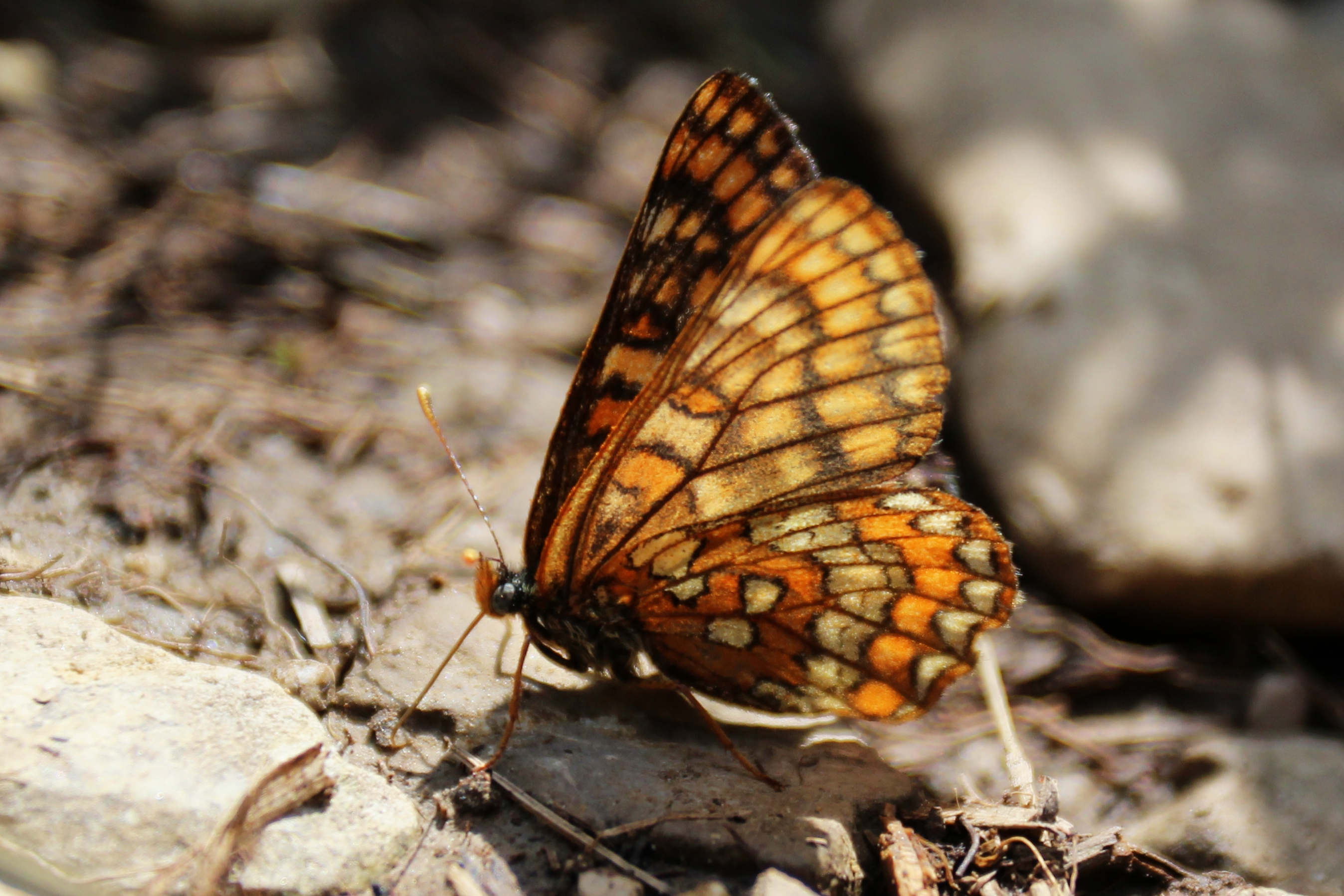 Heckenkirschen-Scheckenfalter (Euphydryas intermedia)